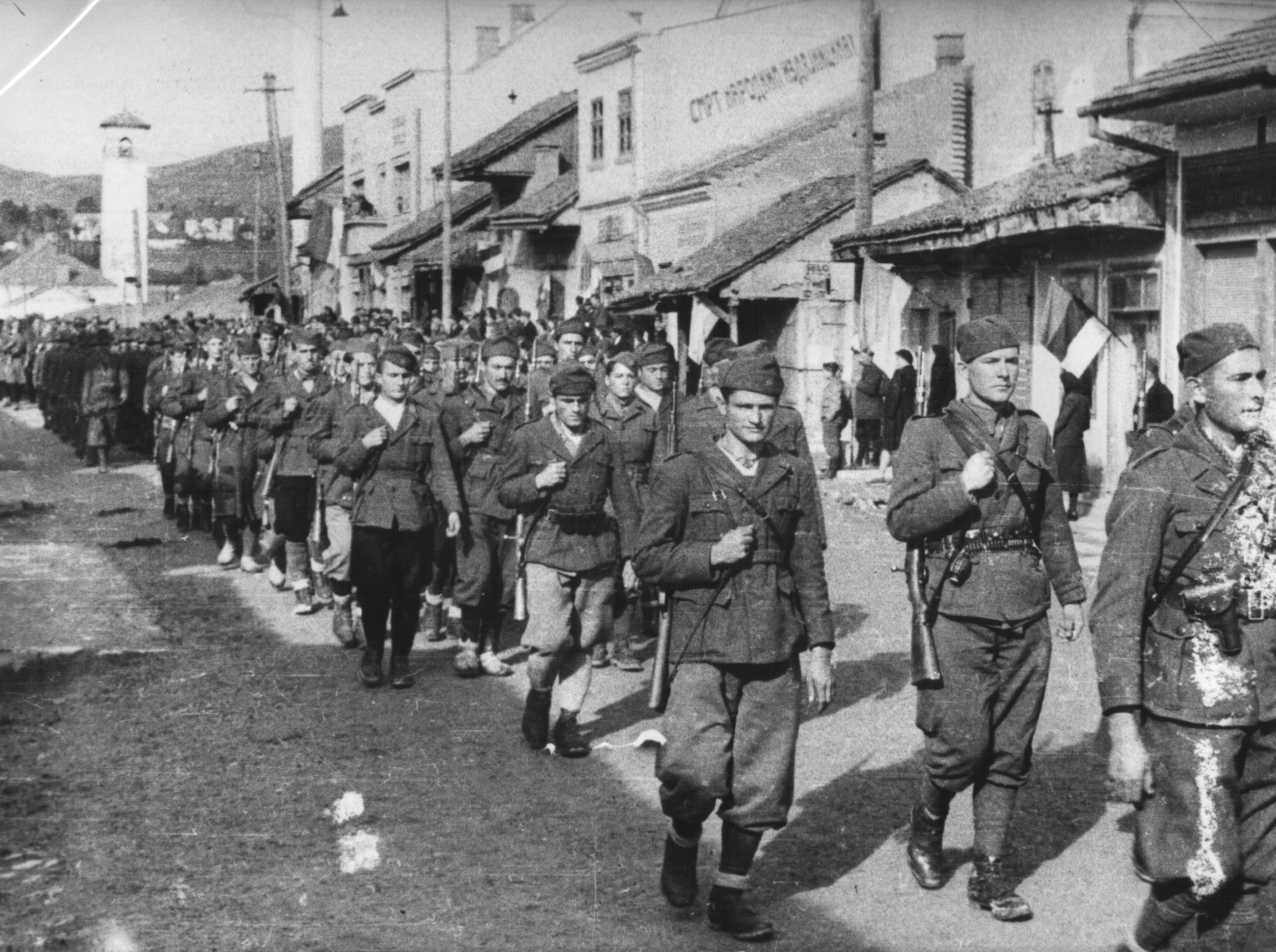 I partigiani jugoslavi della Seconda divisione proletaria entrano a Pljevnja nell'ottobre 1943